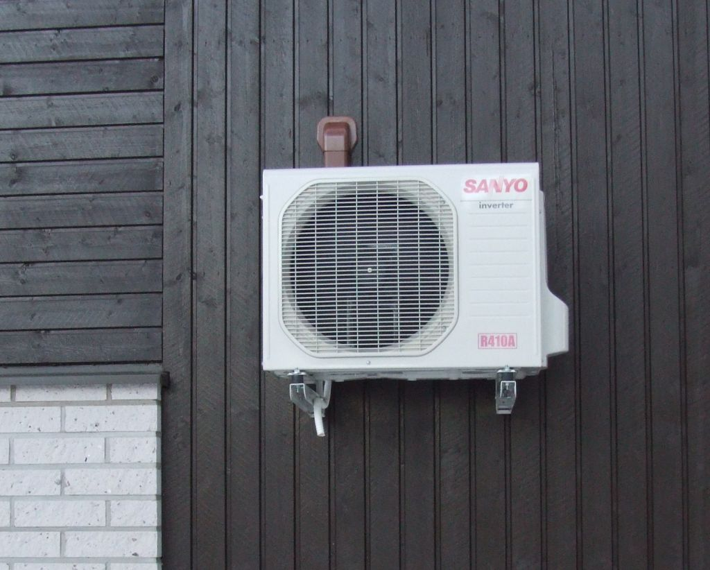 Sanyo SAP-KRV93EHN heat pump outdoor unit Sanyo SAP-KRV93EHN ilmalämpöpumpun ulkoyksikkö